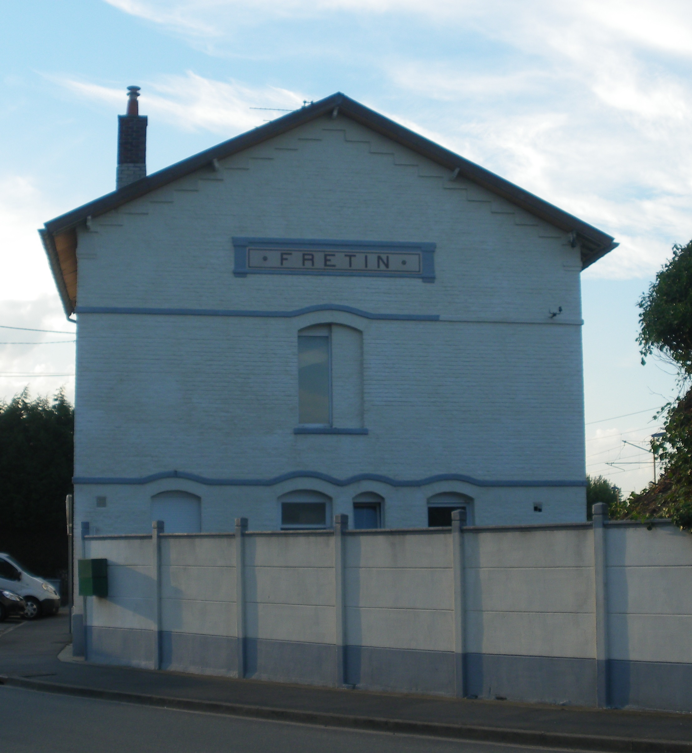 Vue de l'ancienne gare de Fretin.